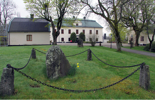 A l'entrée cu château d'Haringe, la dernière demeure d'Axel Wenner-Gren et de son épouse Marguerite Liggett.